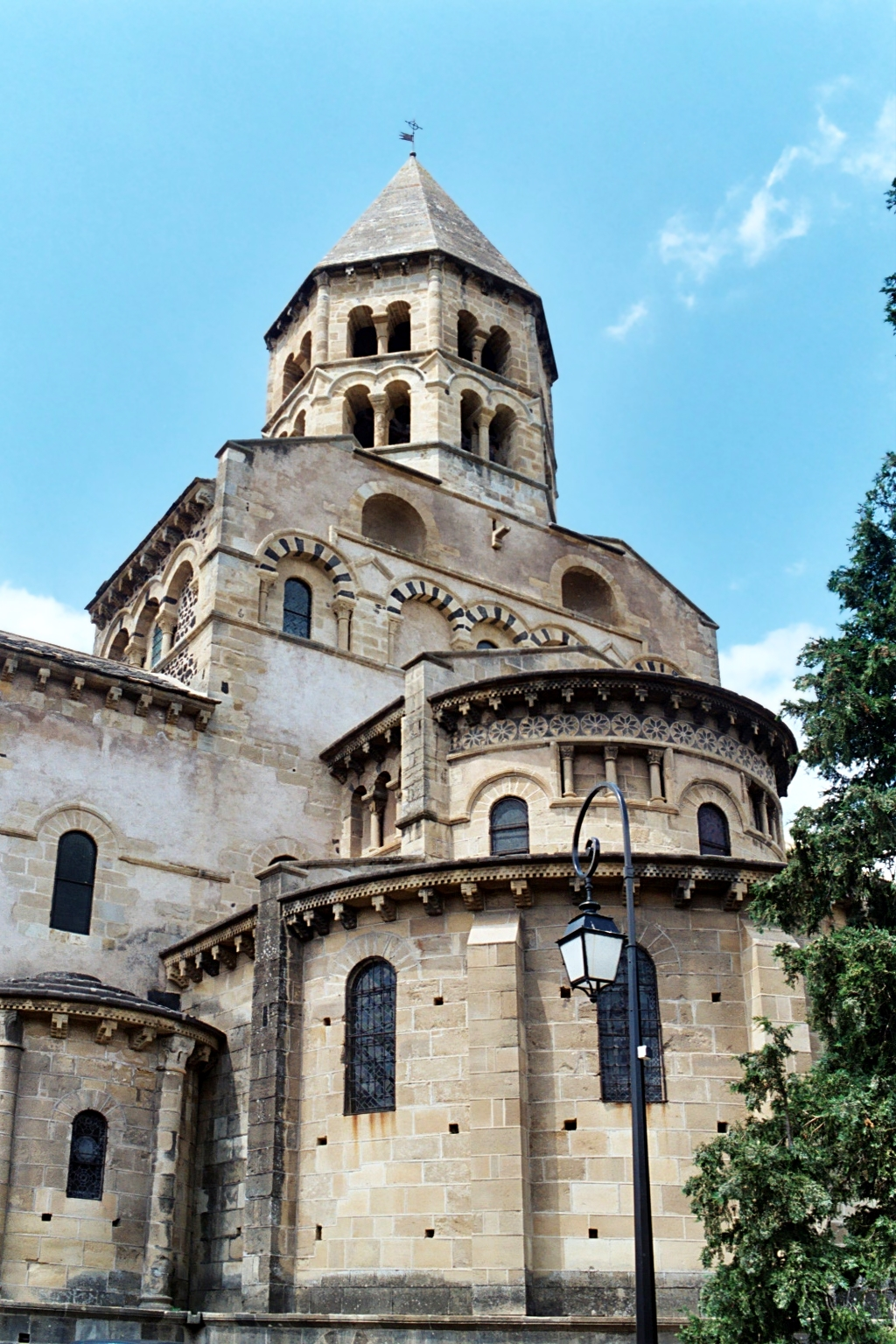 France - Auvergne - Puy-de-Dôme - Église Notre-Dame de Saint-Saturnin - Chevet